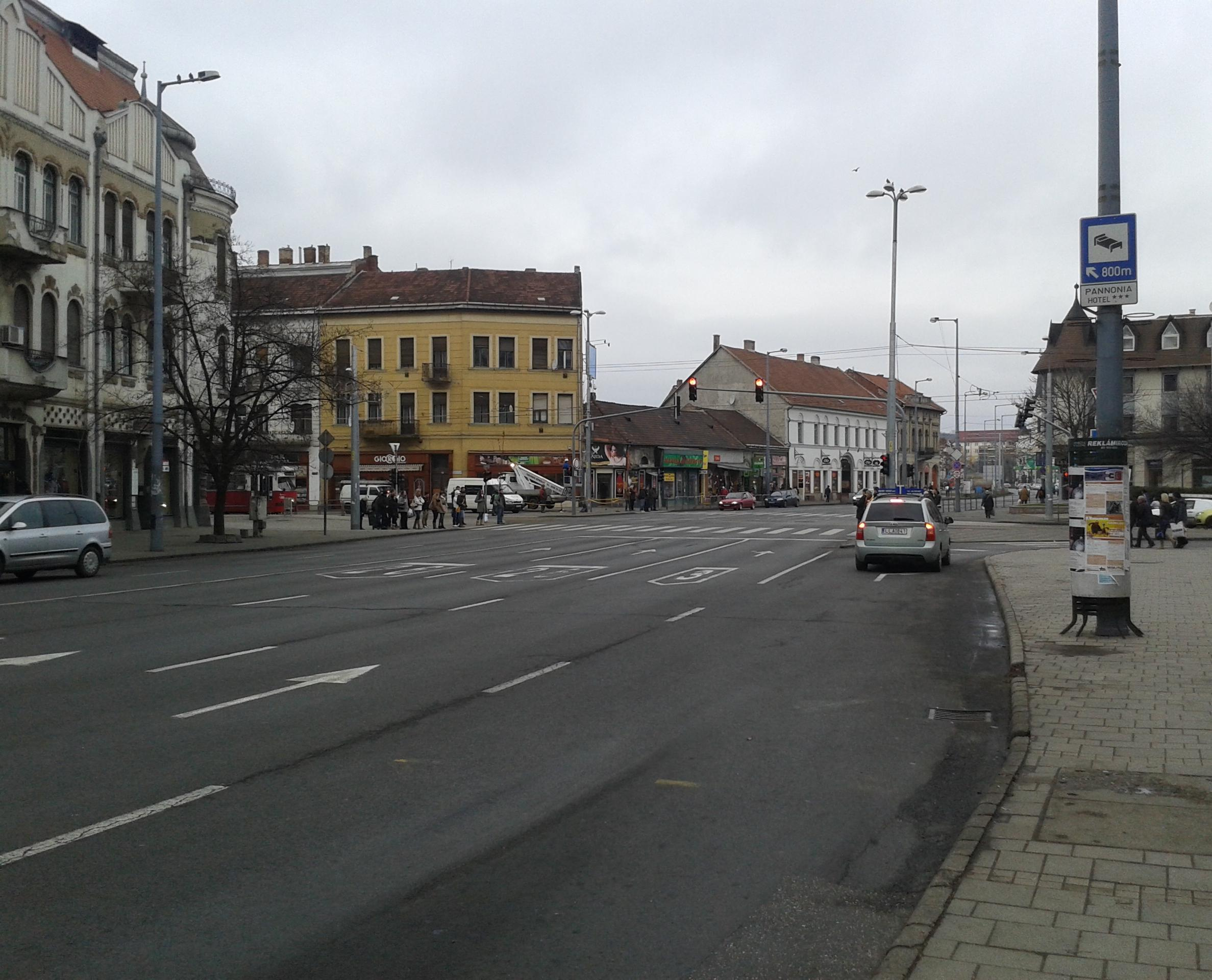 A 3-as út Miskolcon